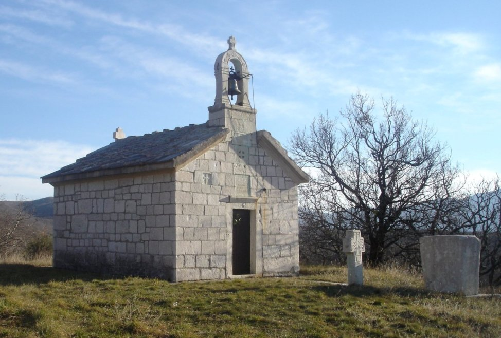 Црква Св. Пророка Илије